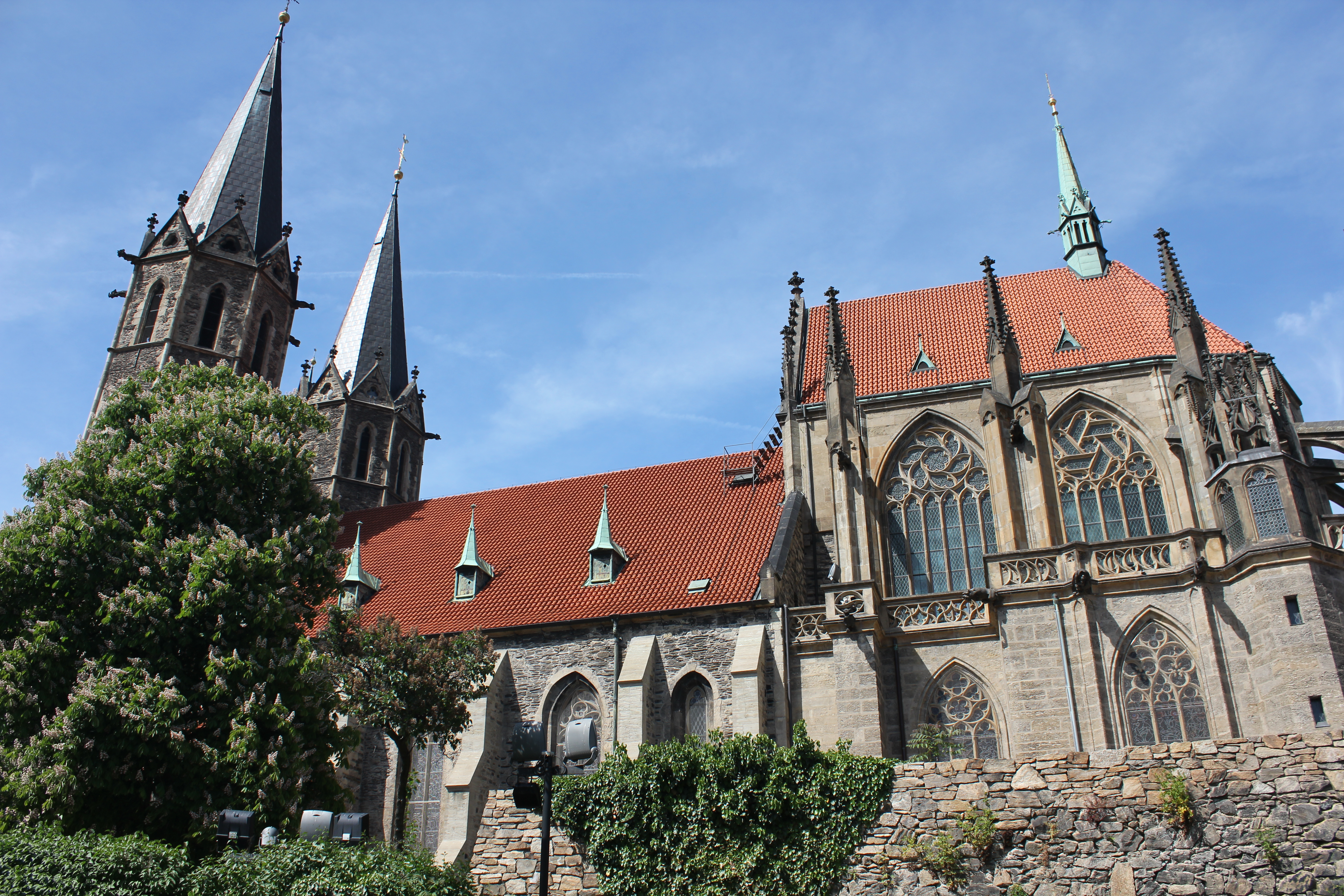 Костёл Святого Варфоломея в Колине